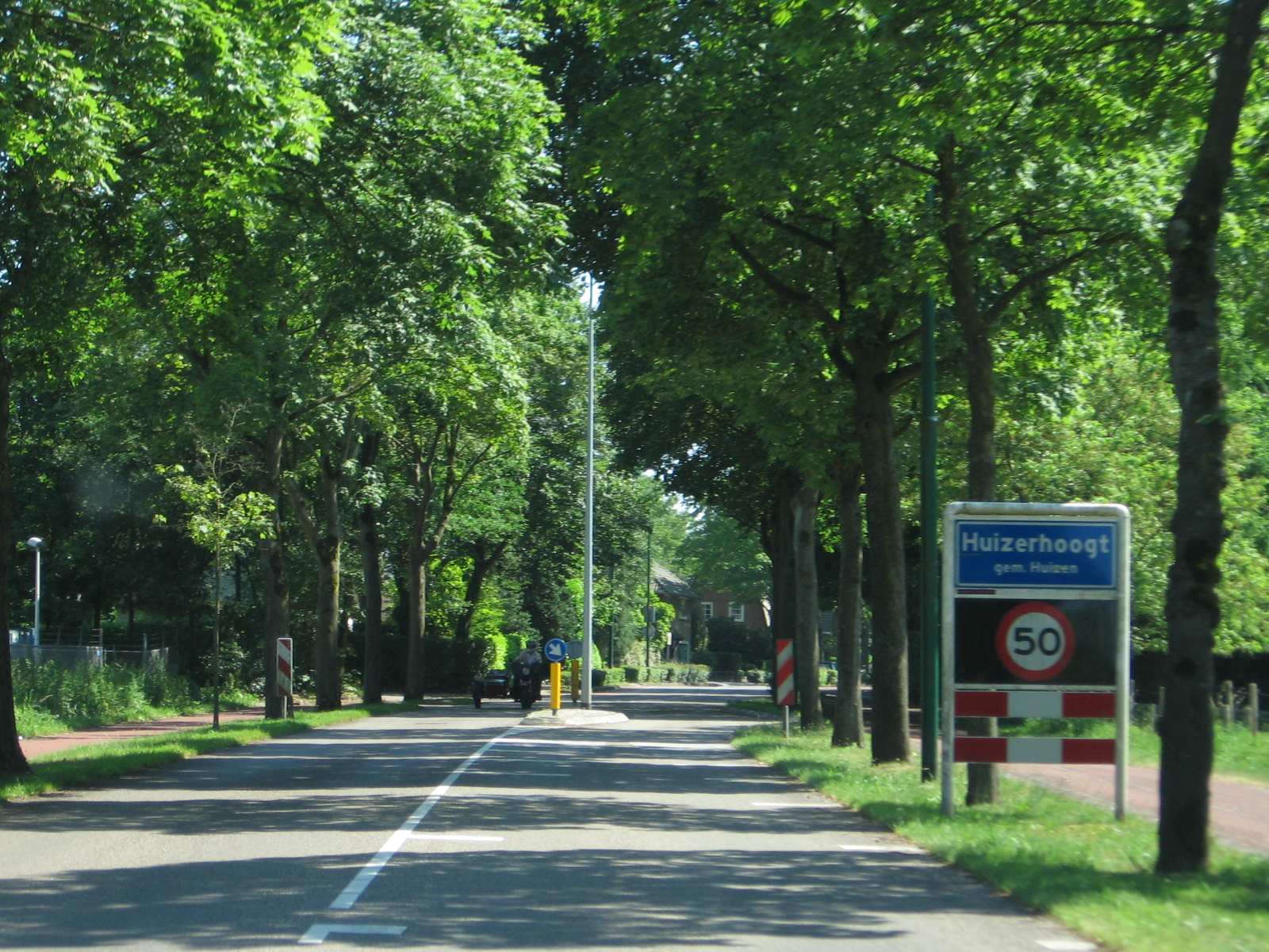 Huizerhoogt, juni 2006